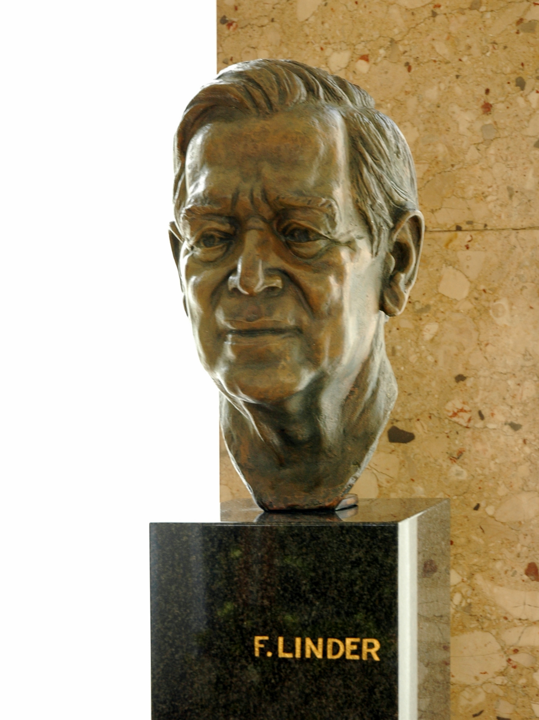 Fritz Linder in Chirurgische Klinik Heidelberg